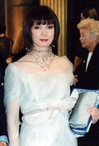 Sabine Azéma à la cérémonie des Césars.